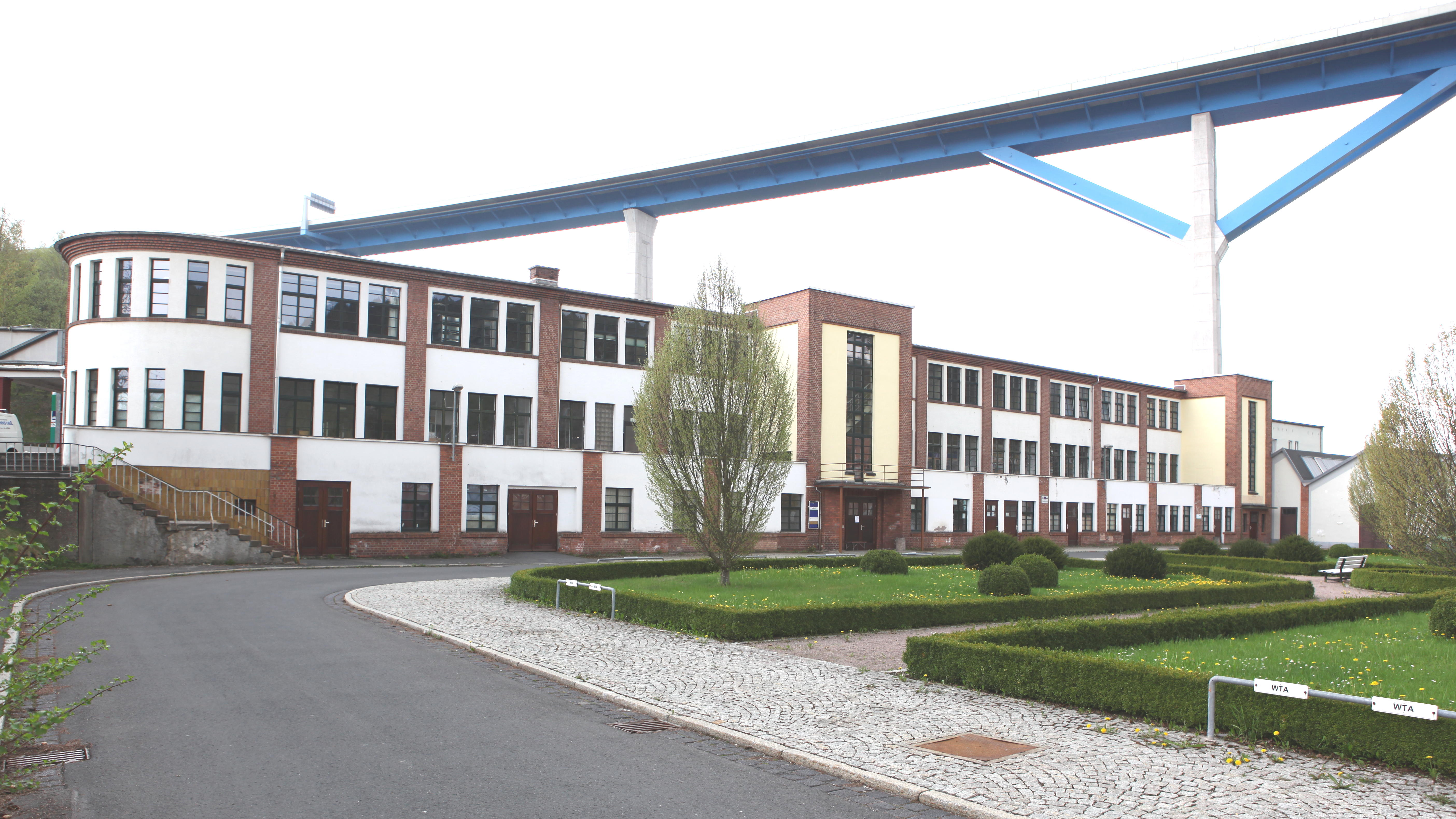 Simson neben Tor A, im Hintergrund die Haseltalbrücke, Suhl